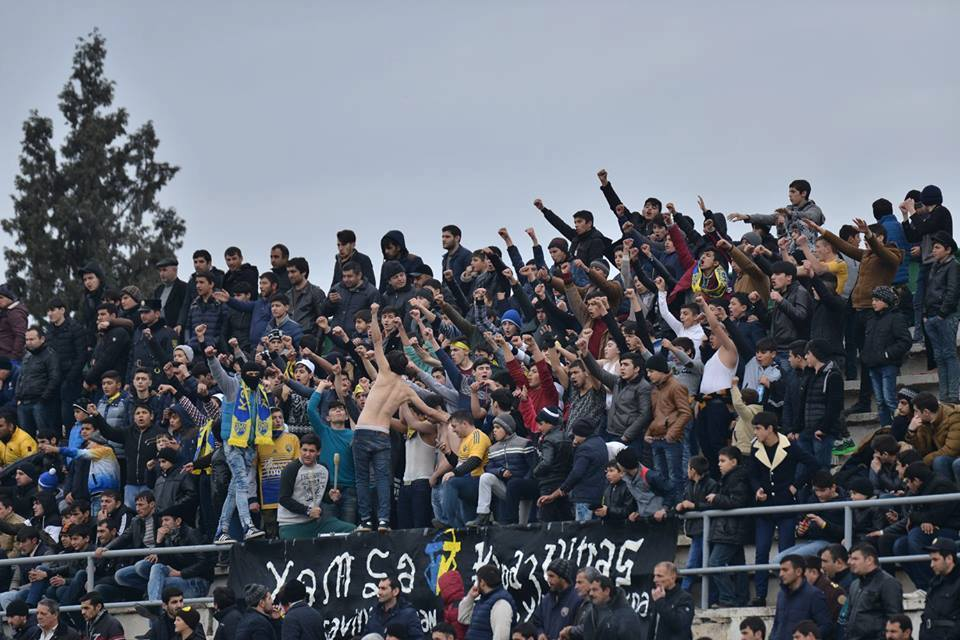 xemse/kapazultras